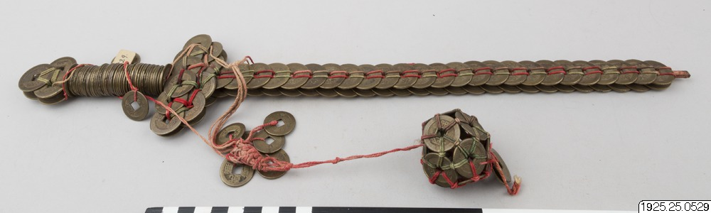 1925.25.0529 China.